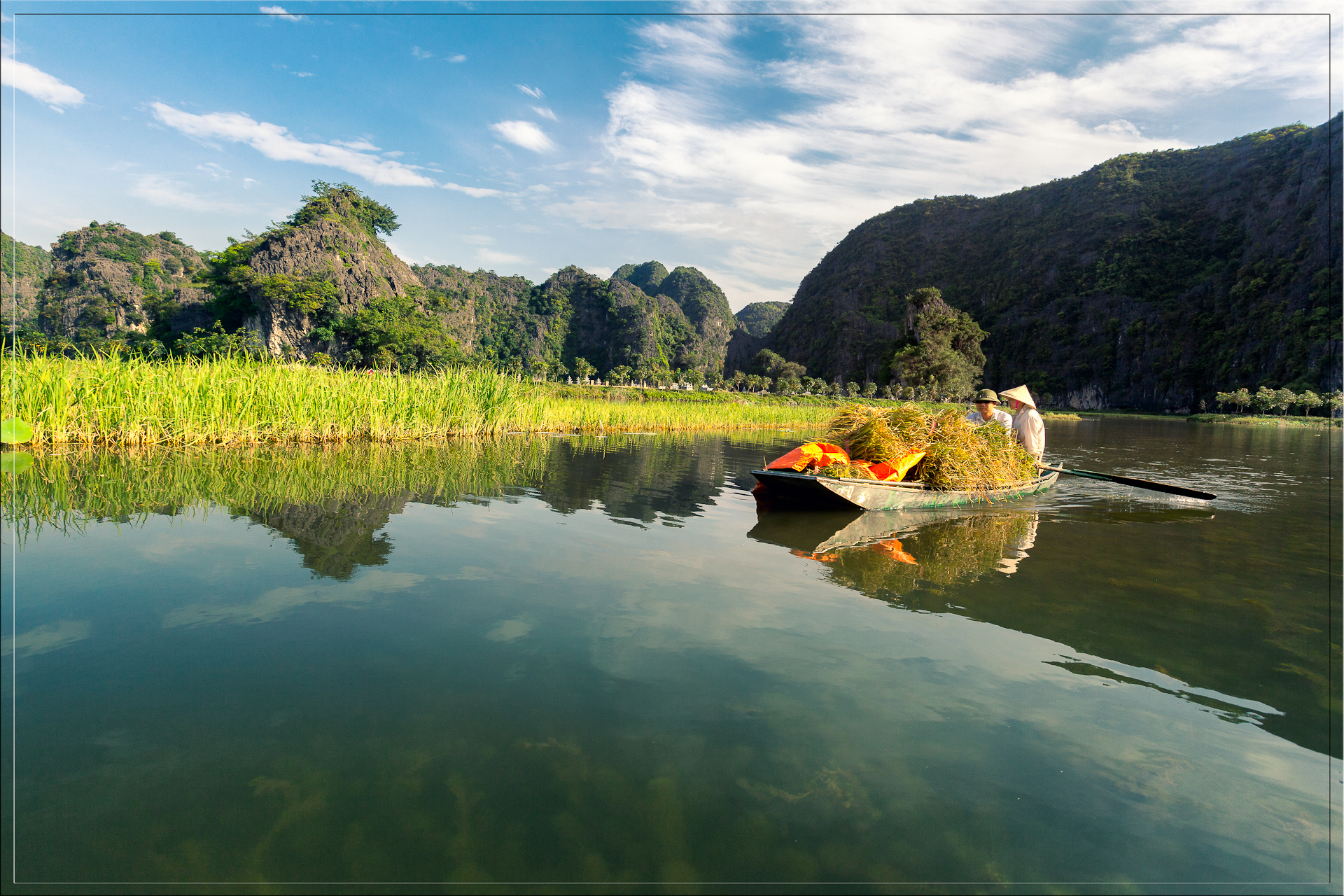 Tam Cốc - Bích Động, còn được biết đến với những cái tên nổi tiếng như "vịnh Hạ Long trên cạn" hay "Nam thiên đệ nhị động" là một khu du lịch trọng điểm quốc gia Việt Nam.